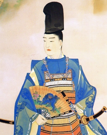 霊山神社所蔵